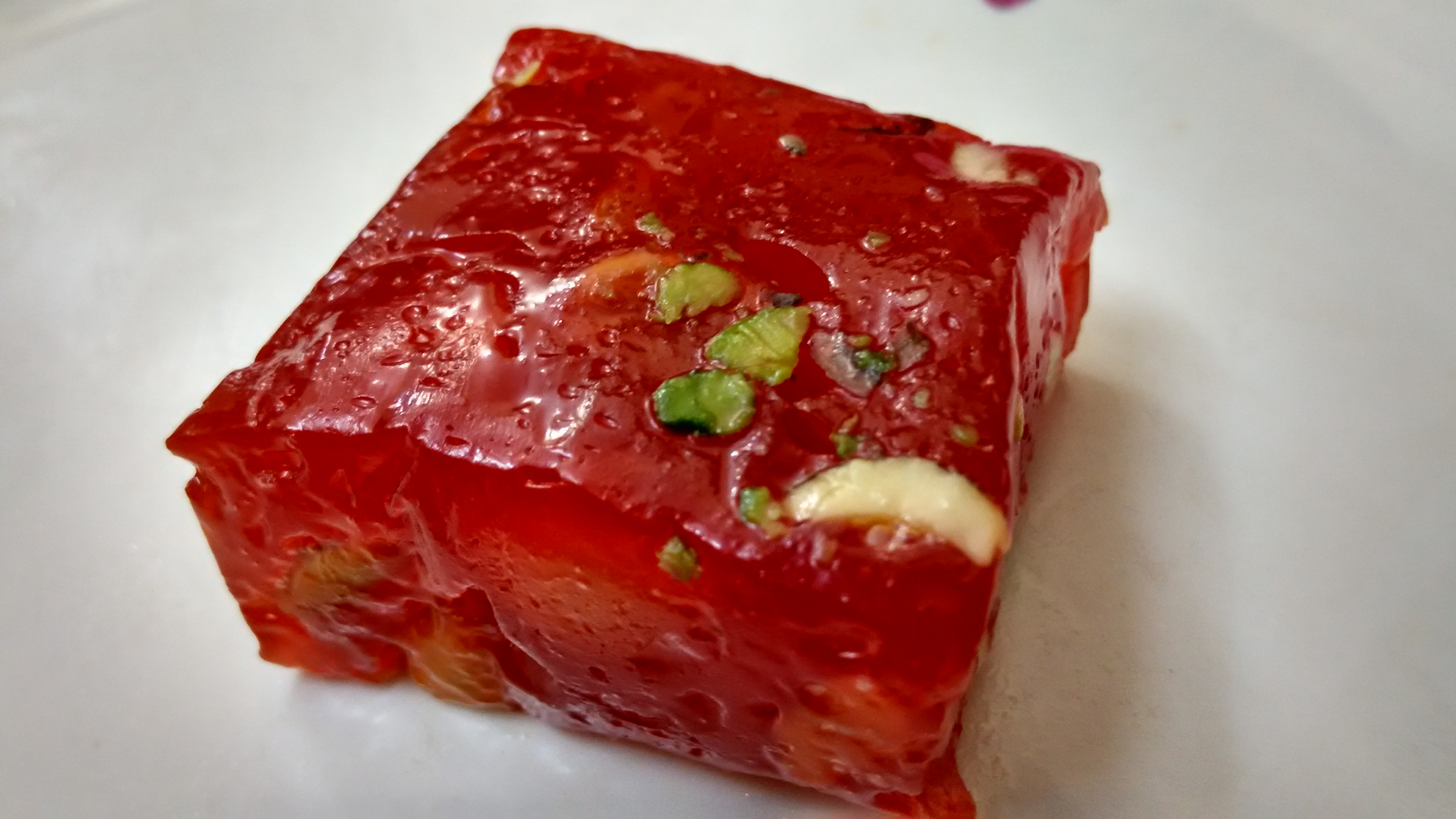 கோதுமை அல்வா.